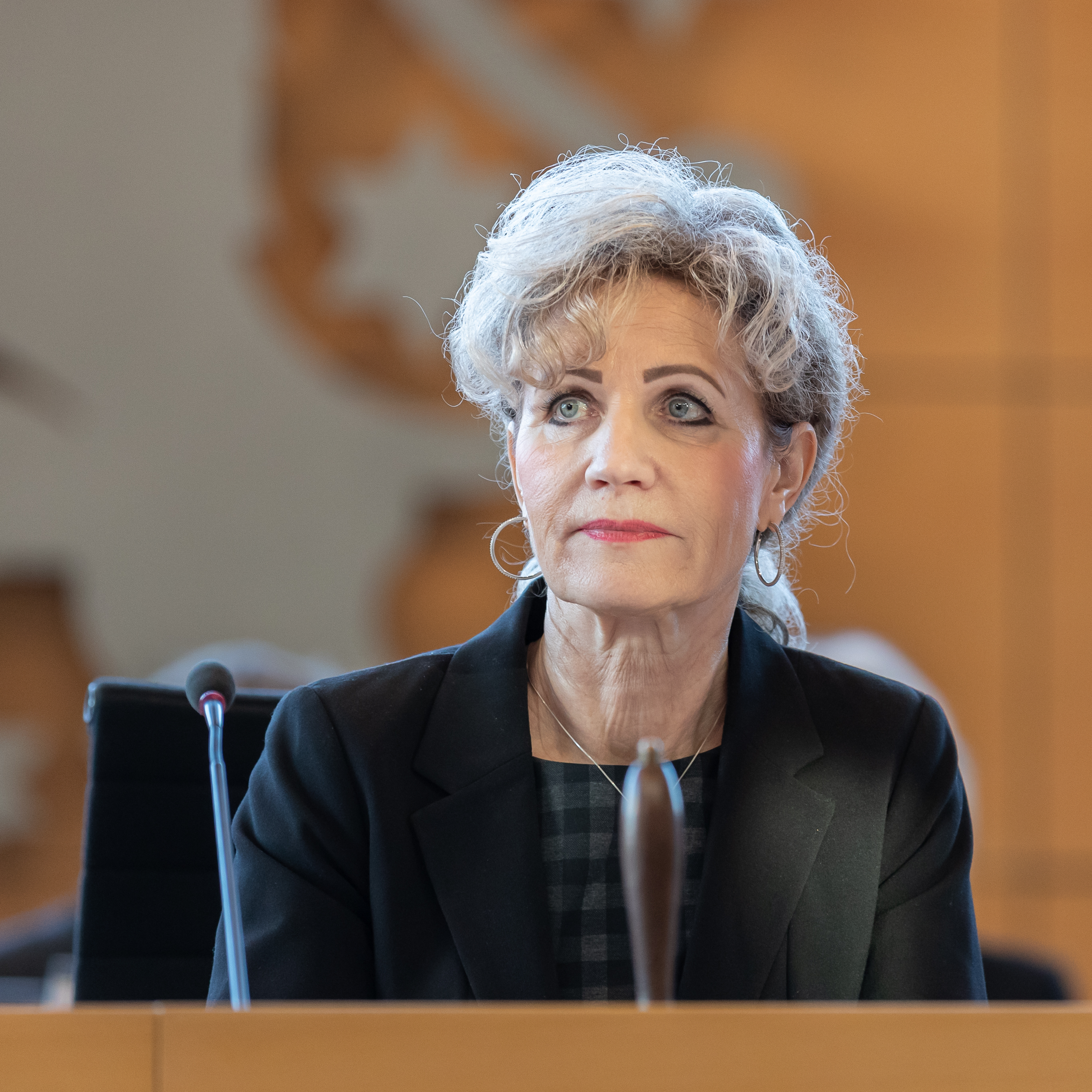 Thüringer Landtag, Wahl des Ministerpräsidenten: Birgit Keller (Die Linke, Landtagspräsidentin); Porträt, Einzelbild